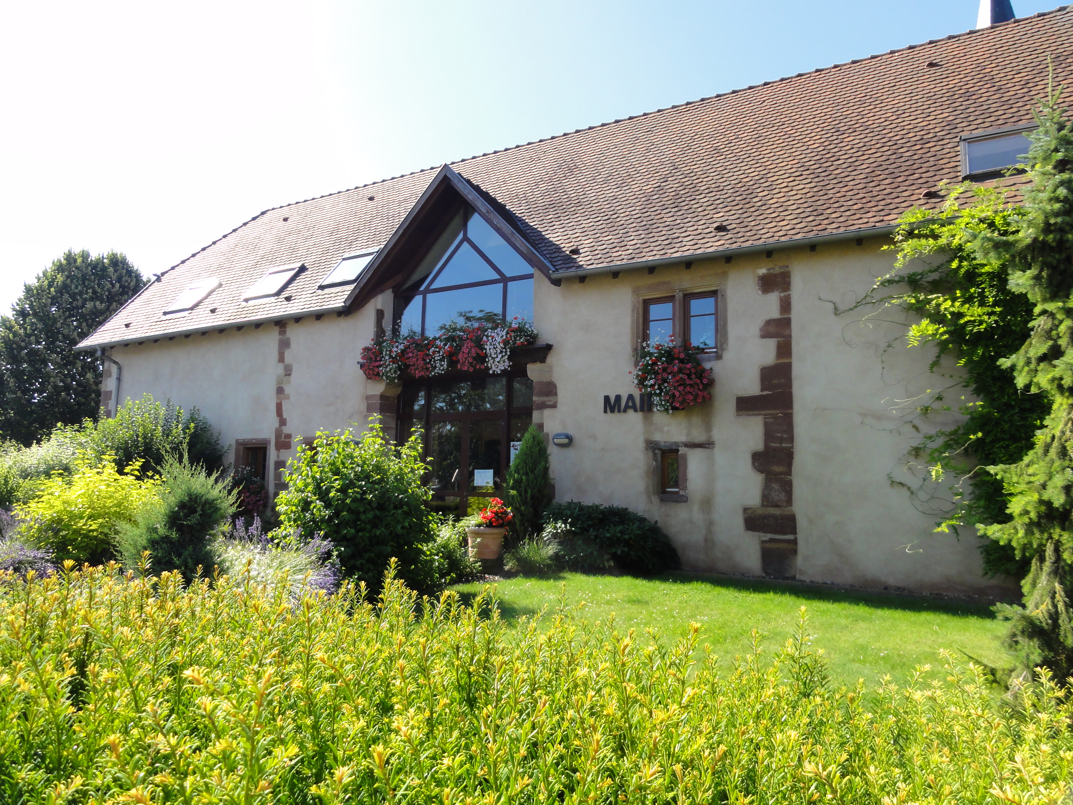 Alsace, Bas-Rhin, Schnersheim, Mairie, Ancienne grange dîmière aménagée en bâtiment communal (XVIe-XVIIIe): .